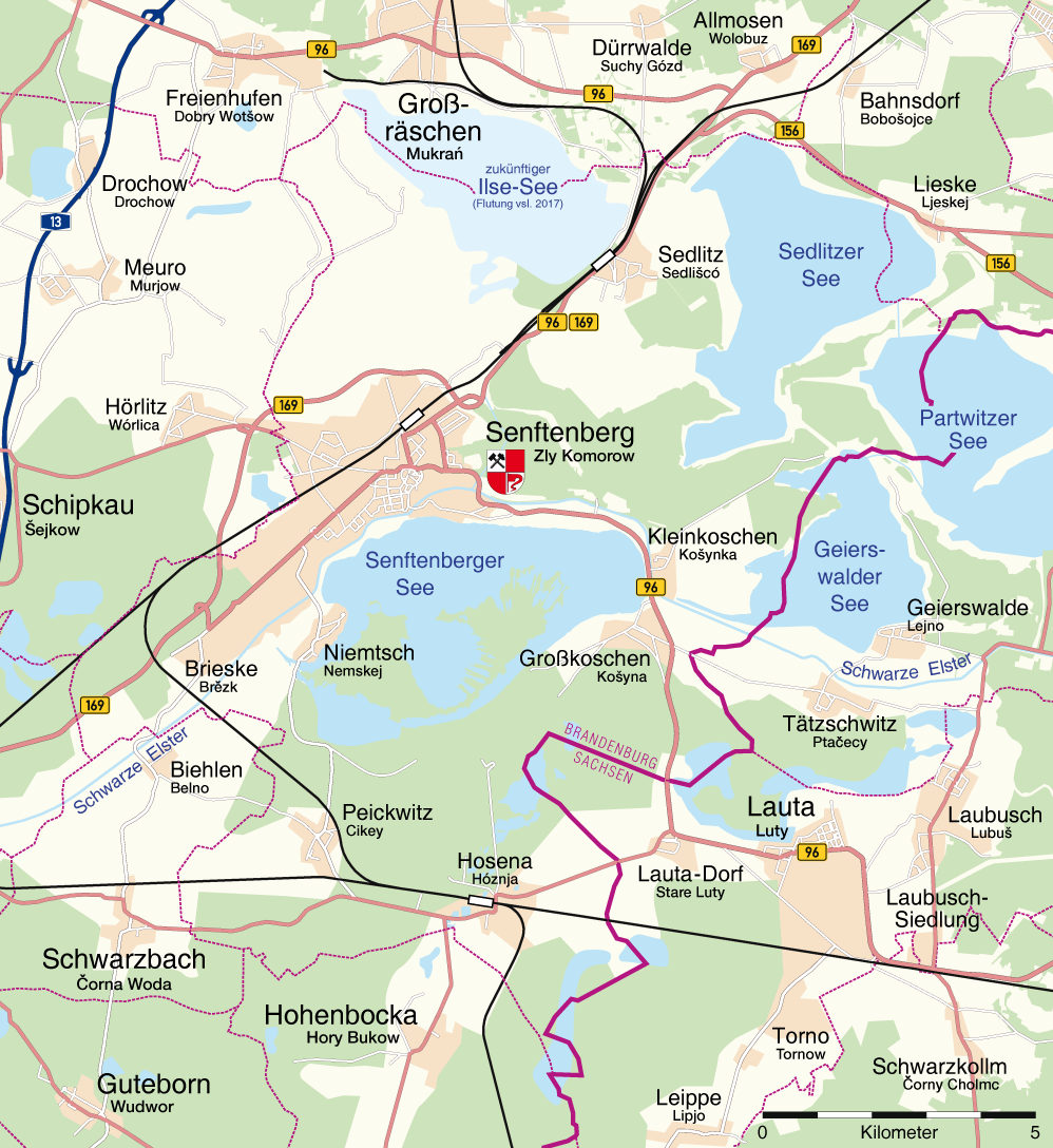 Karte von Senftenberg